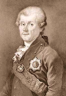 Mikhail Khakovski